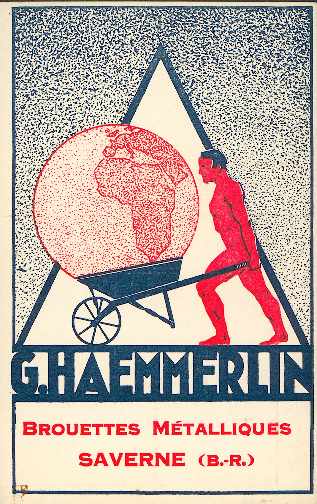 Ancien Logo Haemmerlin "Porte le monde" 1895